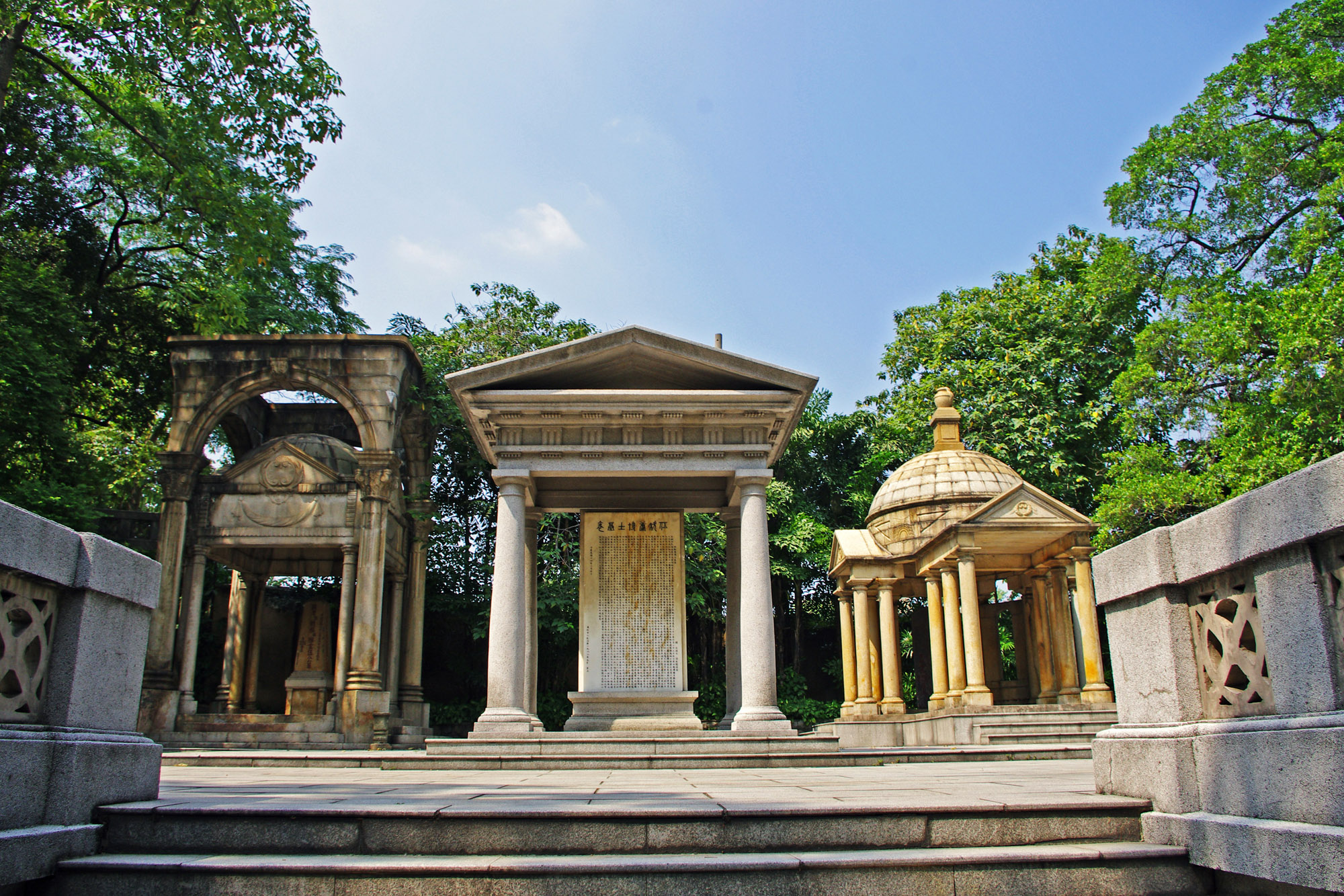 广州越秀山伍庭芳之墓